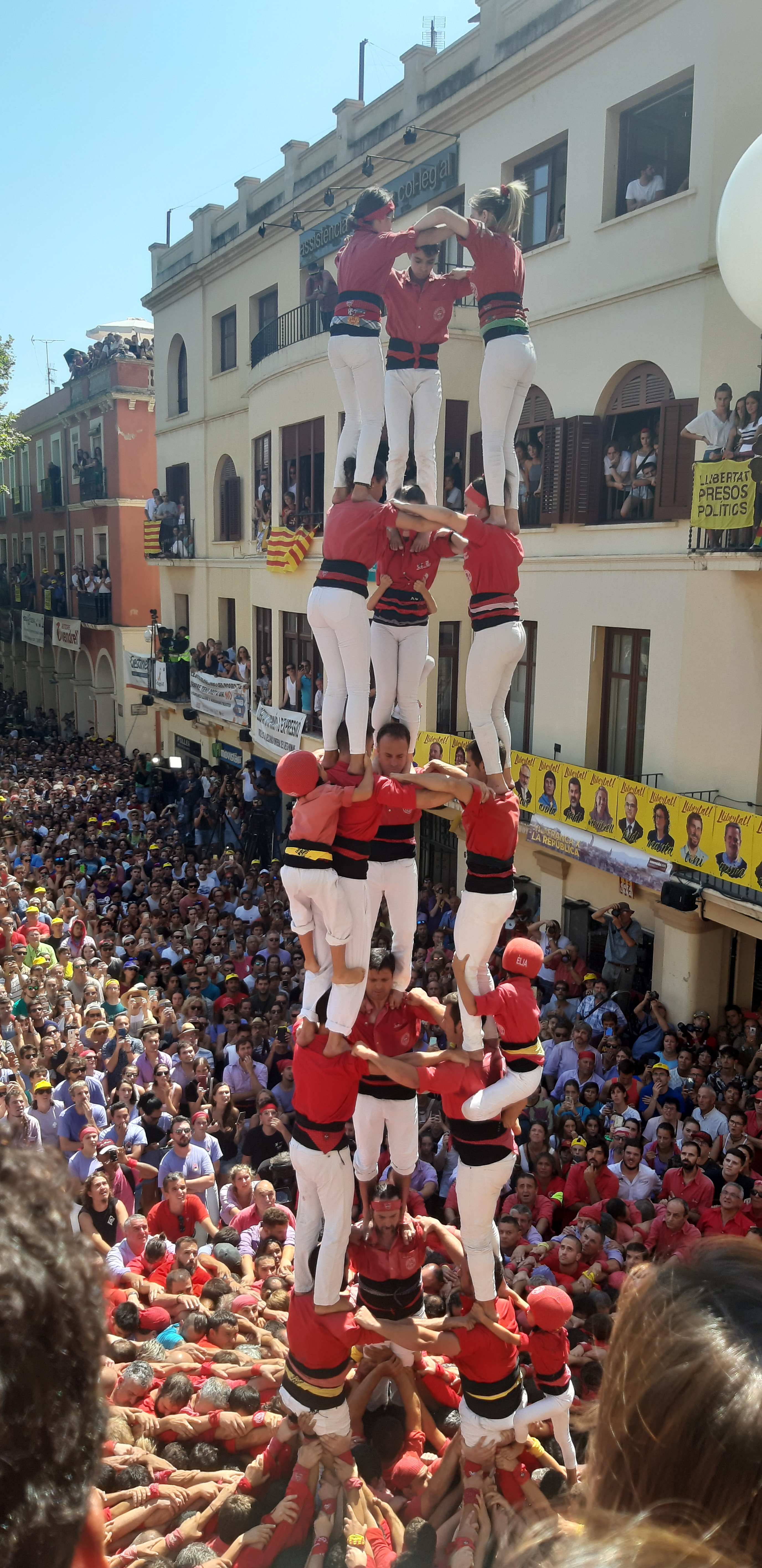 Intent de 3 de 9 sense folre fet per la Colla Joves Xiquets de Valls a la Diada de Ssnt Fèlix 2019